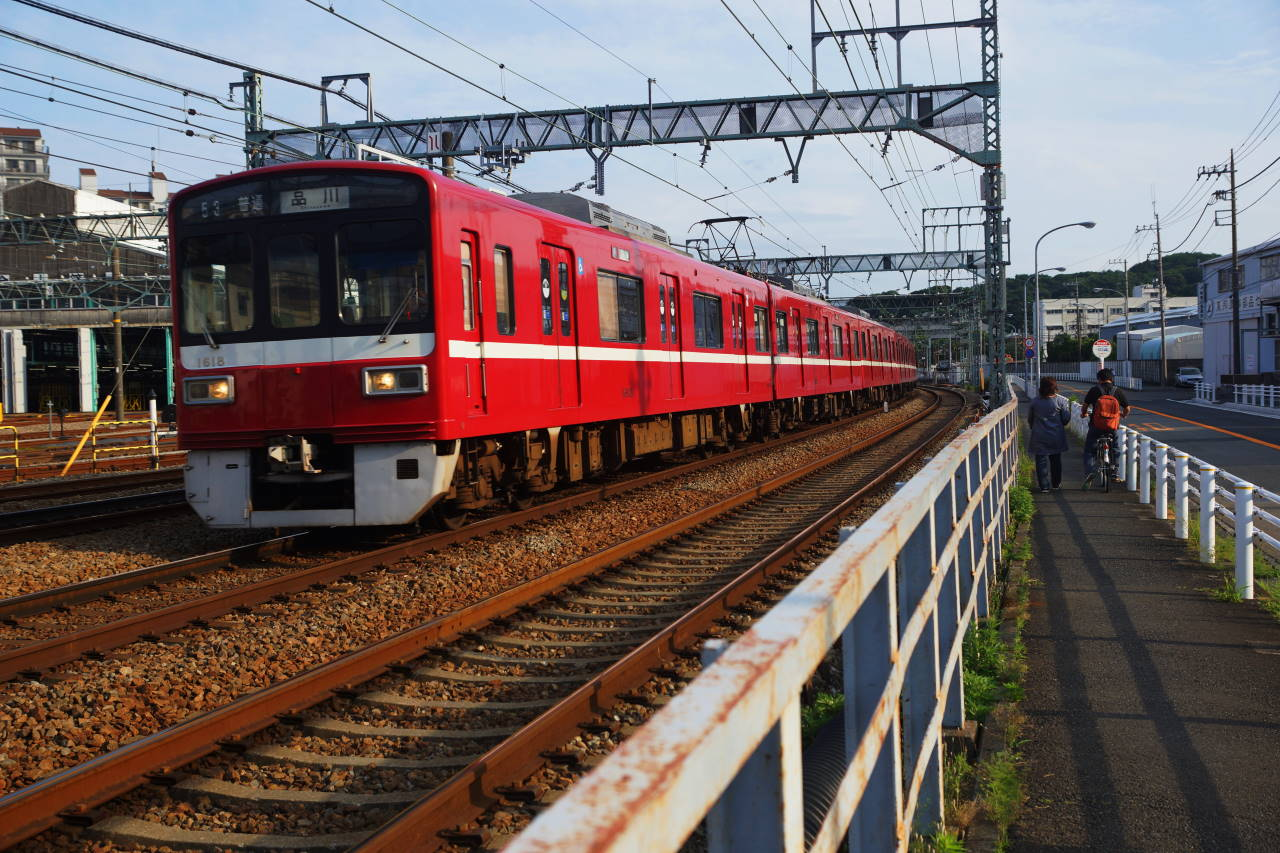 金沢区大川